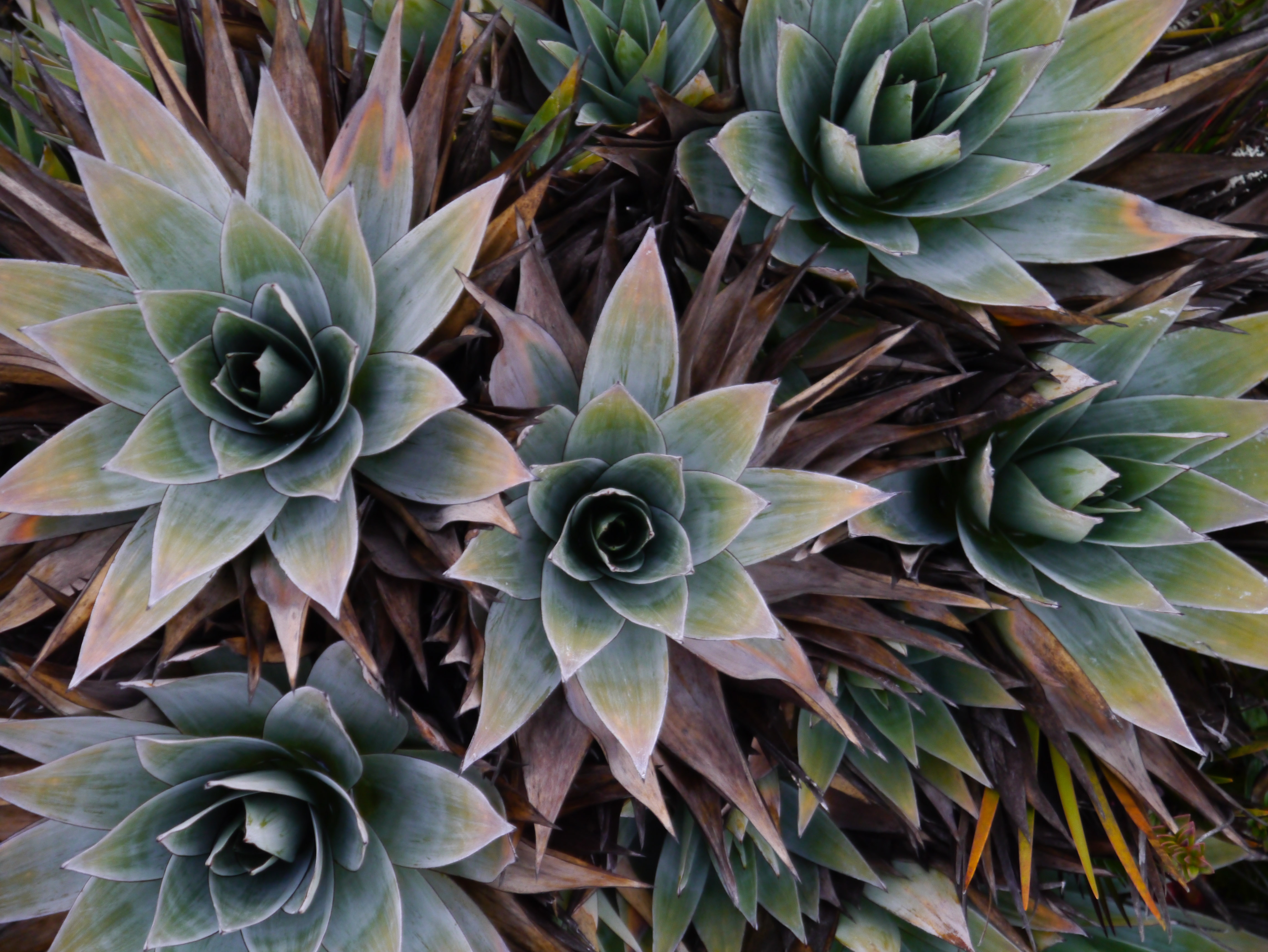 Mount Roraima, Venezuela